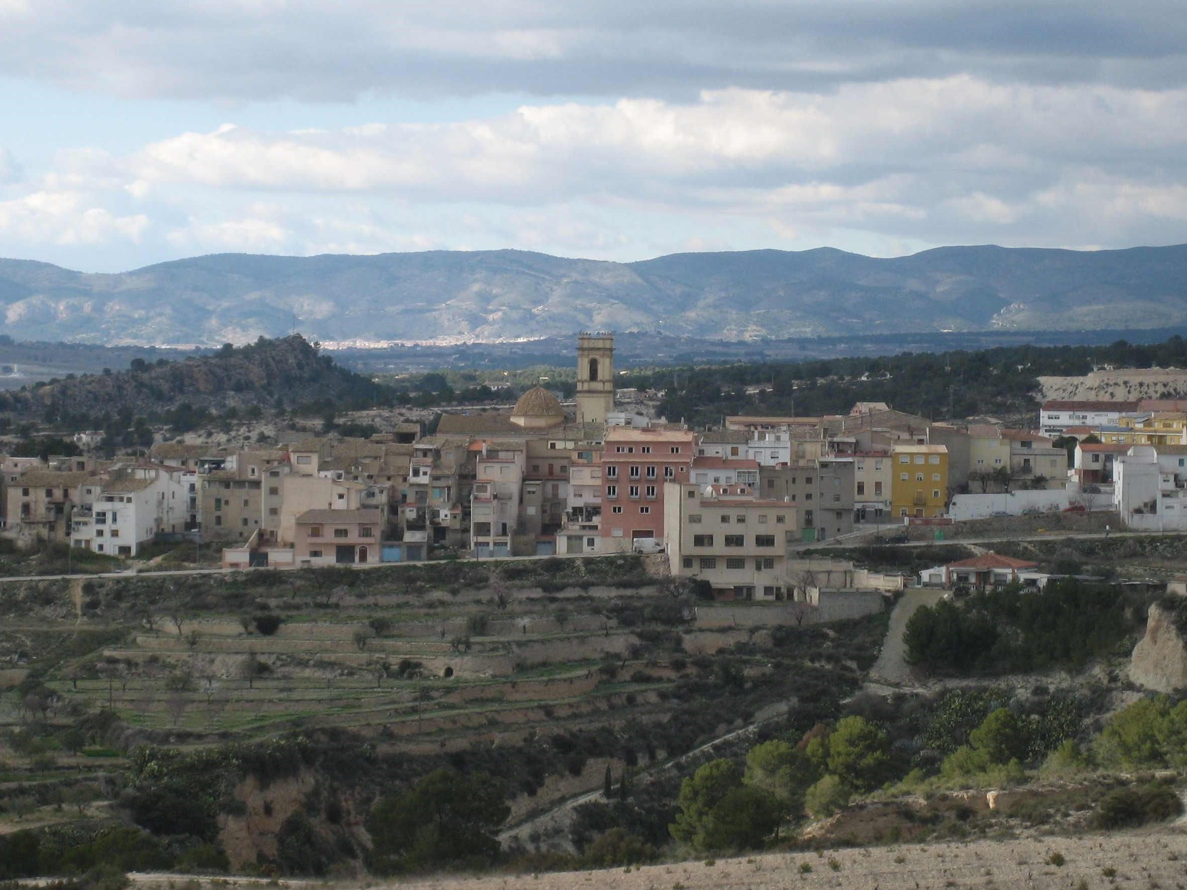 Vista de la localidad de Tibi (Alicante, España) desde el antiguo castillo musulmán. Foto realizada por Rodriguillo el 24/02/2005.